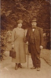 פינחס במברגר בהמבורג